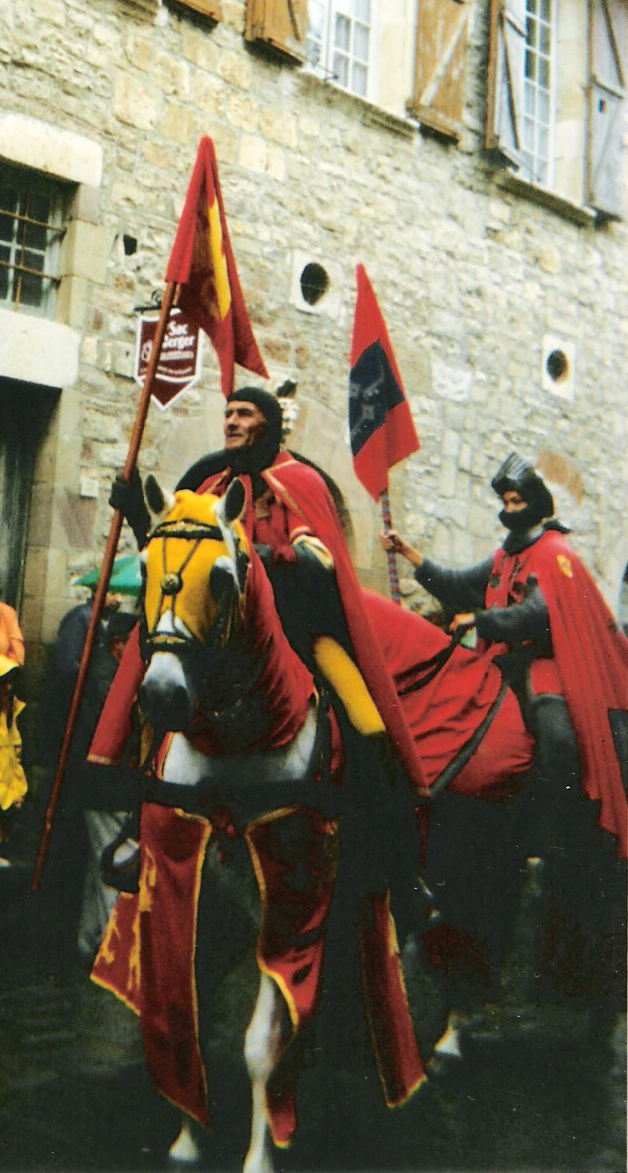 Cavaliers en costume médiéval pendant le défilé du Grand Fauconnier à Cordes-sur-Ciel (France, Tarn).